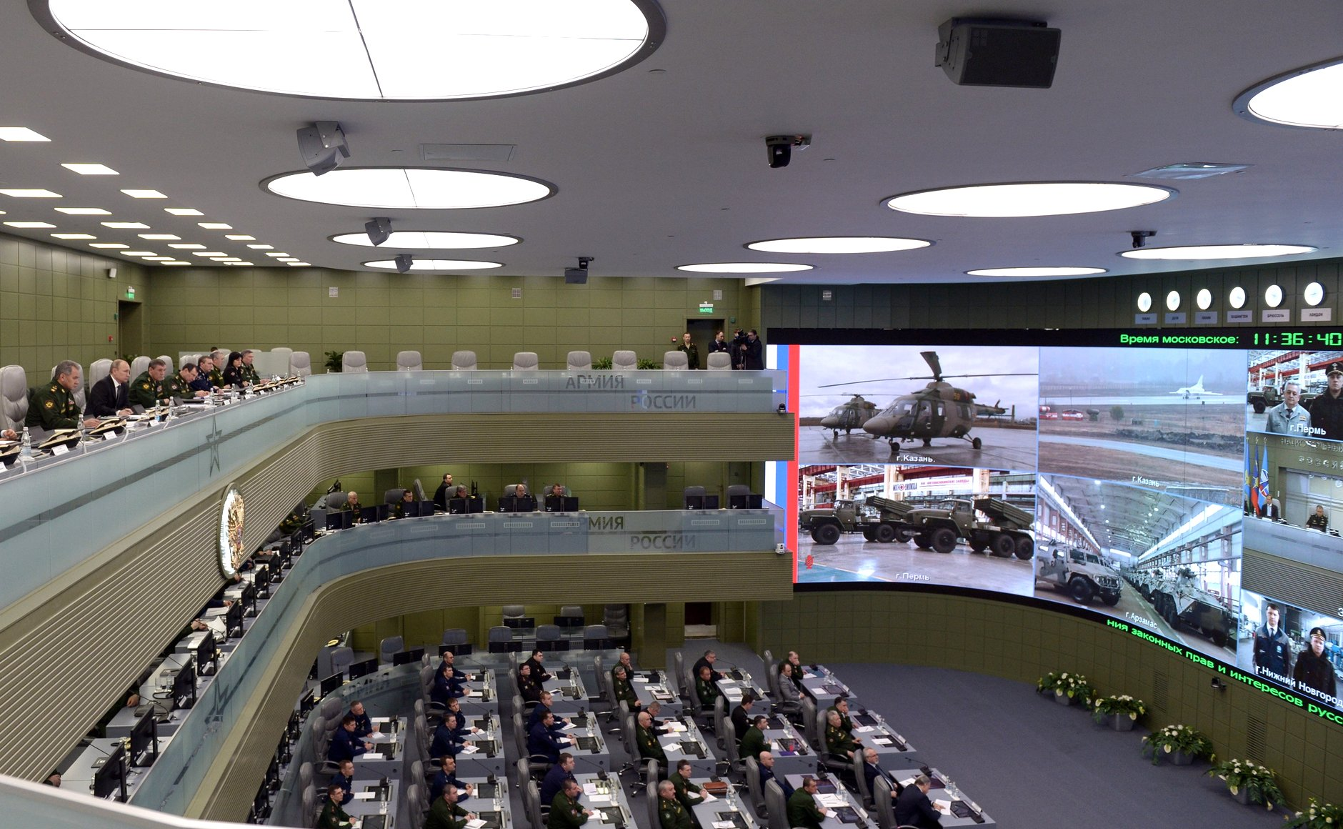 Владимир Путин в Национальном центре управления обороной Российской Федерации